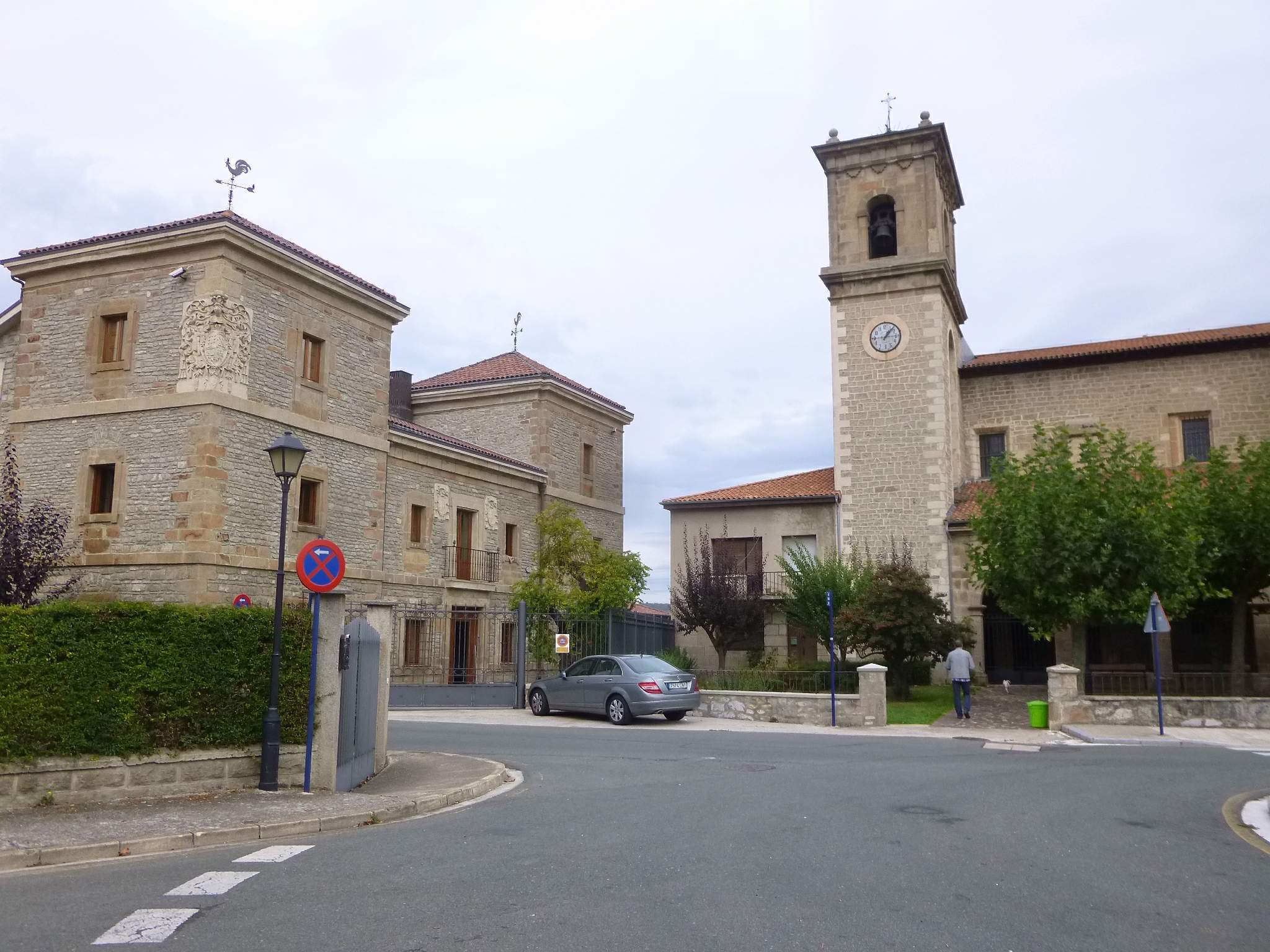 Vitoria - Gamarra Mayor